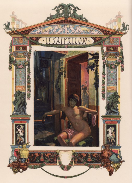 Illustration du Satyricon de Pétrone par Georges-Antoine Rochegrosse.